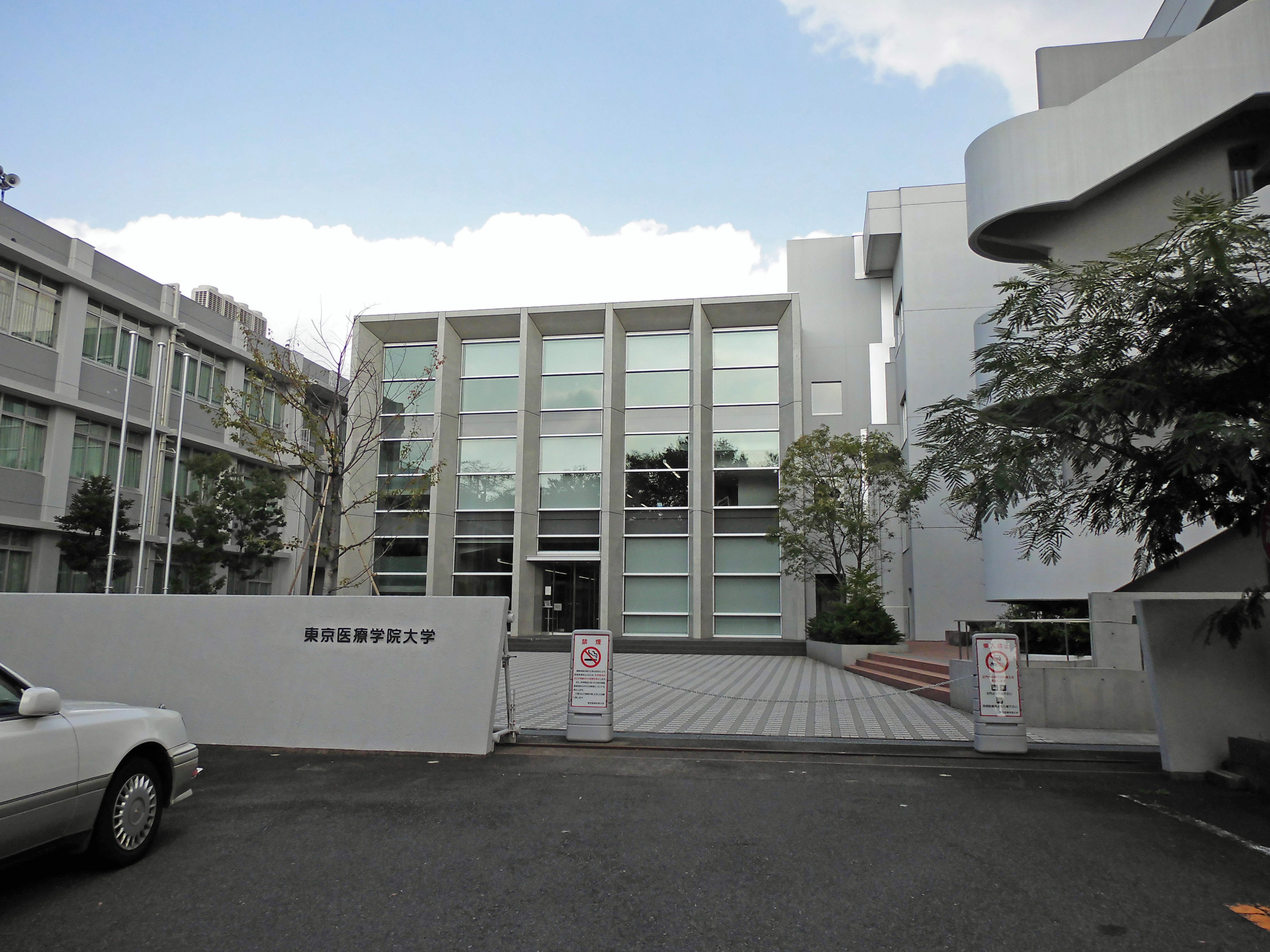 東京医療学院大学130914